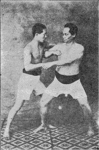 本部朝基の組手(Kumite of Motobu Choki)